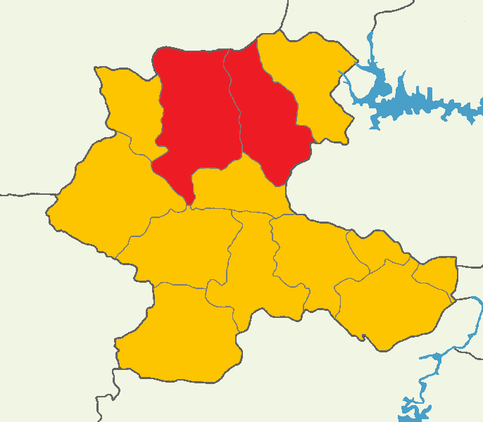 Malatya'da 2014 Türkiye cumhurbaşkanlığı seçimi